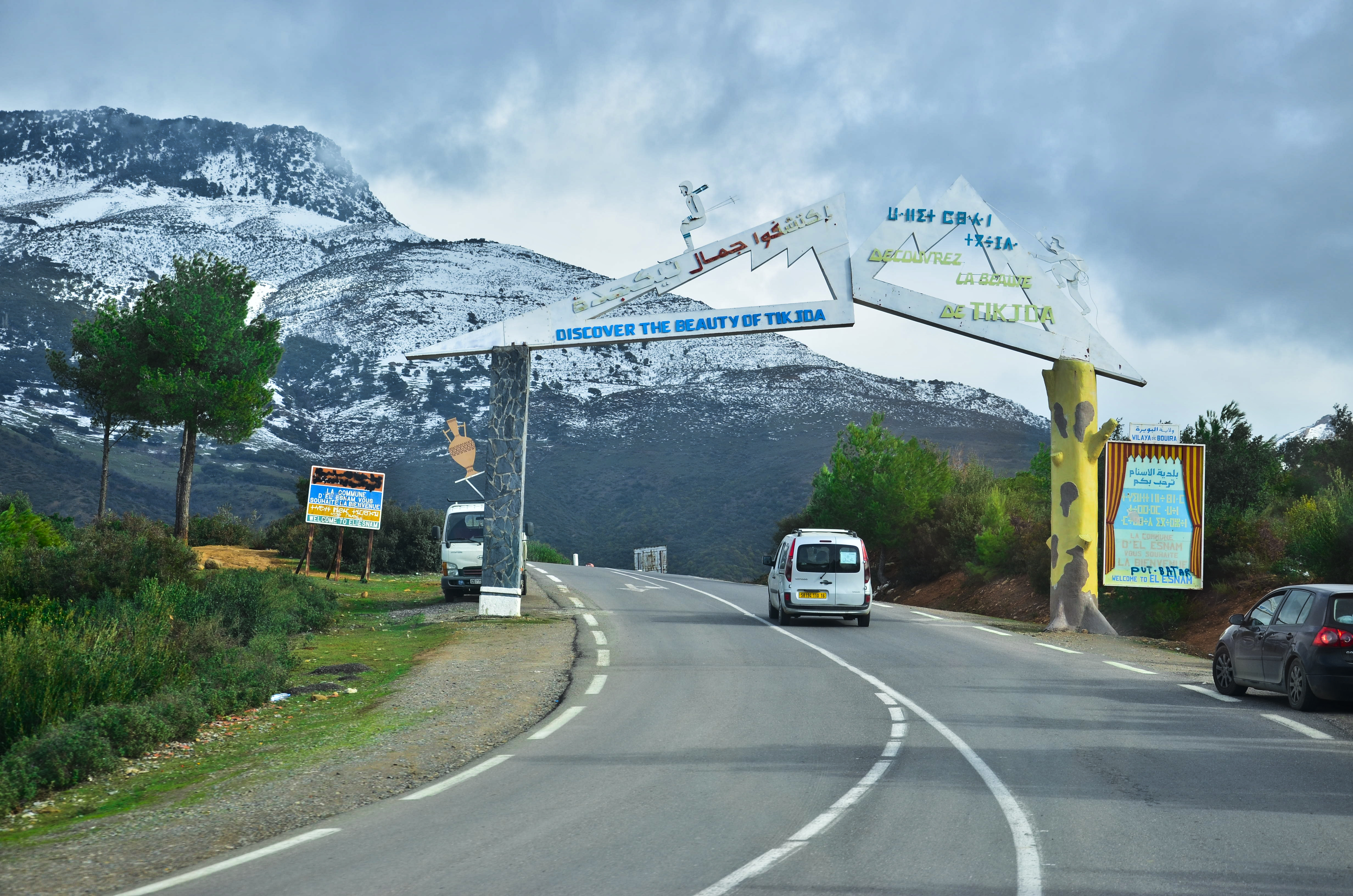 BIENVENUE A TIKJDA